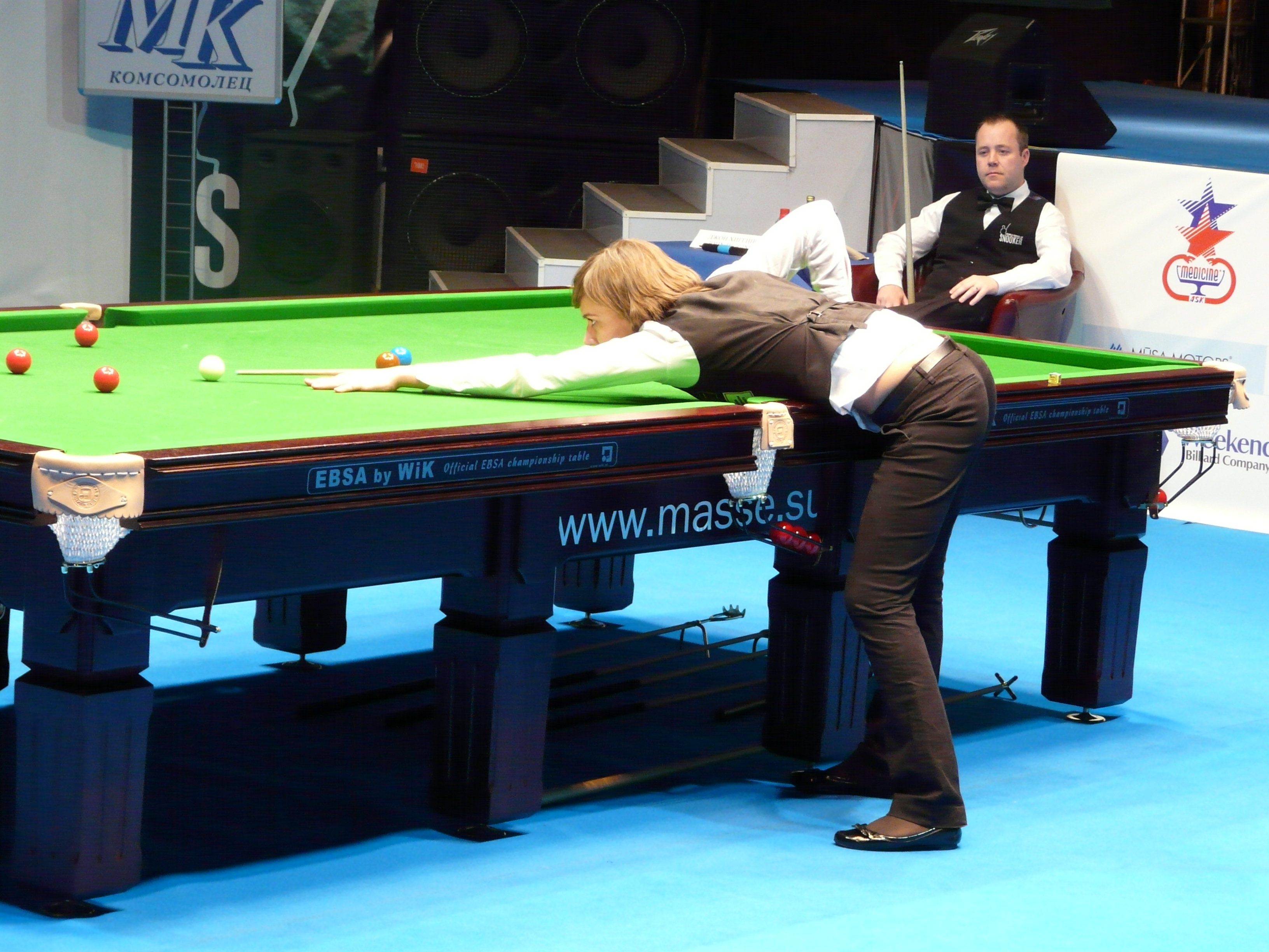 Туринир World Series of Snooker в Москве